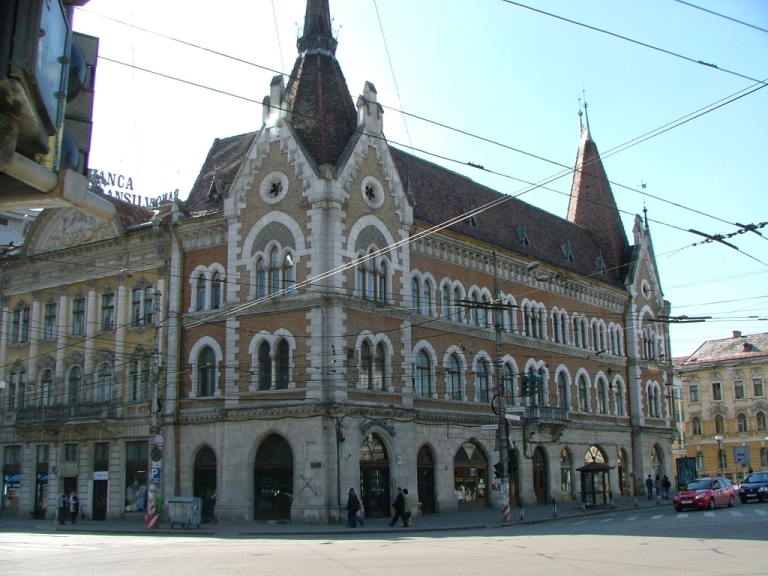 Cluj-Napoca, Palatul Széki, str. Regele Ferdinand nr. 37 colț cu str. G.Bariţiu